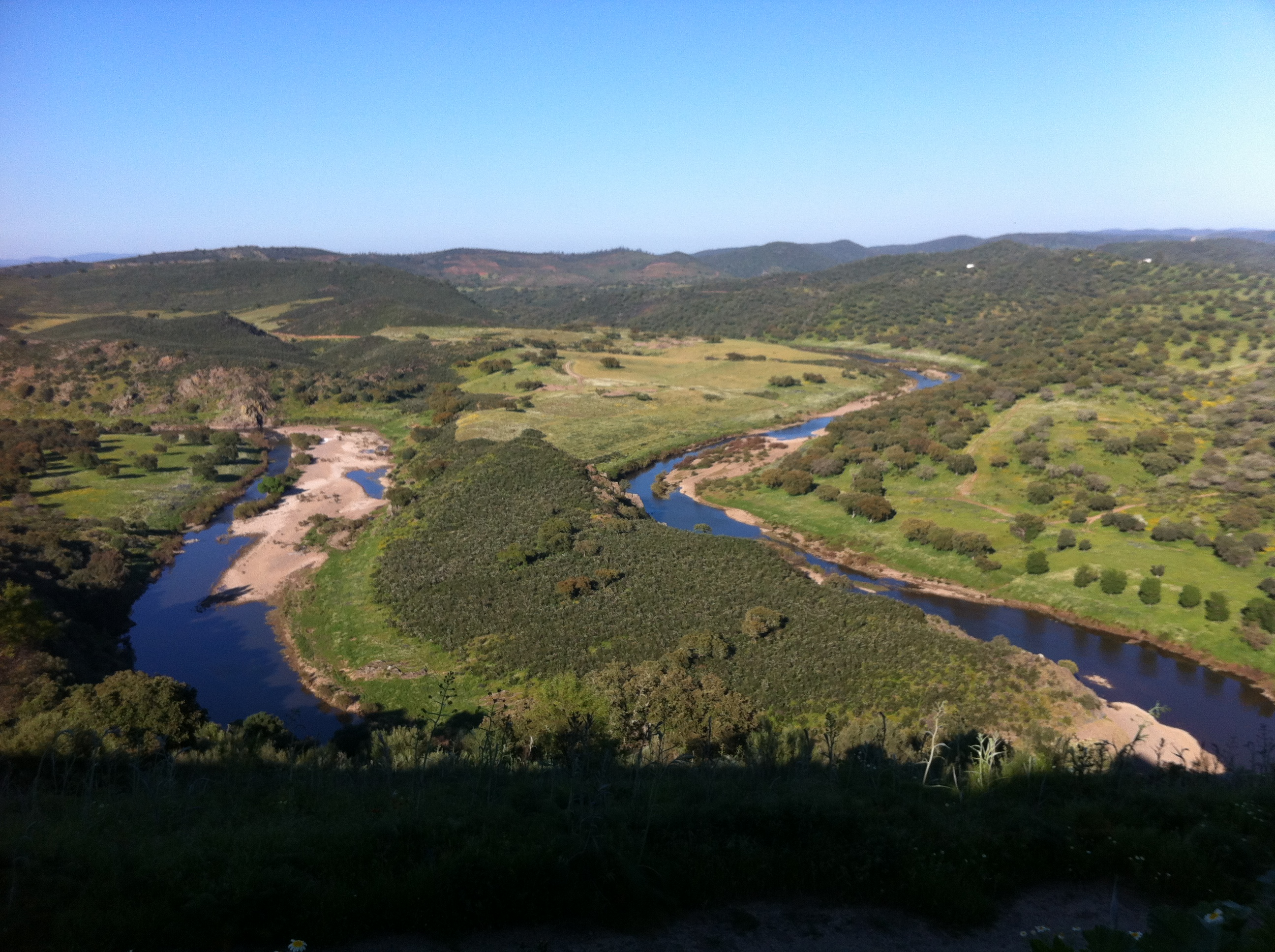 Vista do Castelo de Noudar